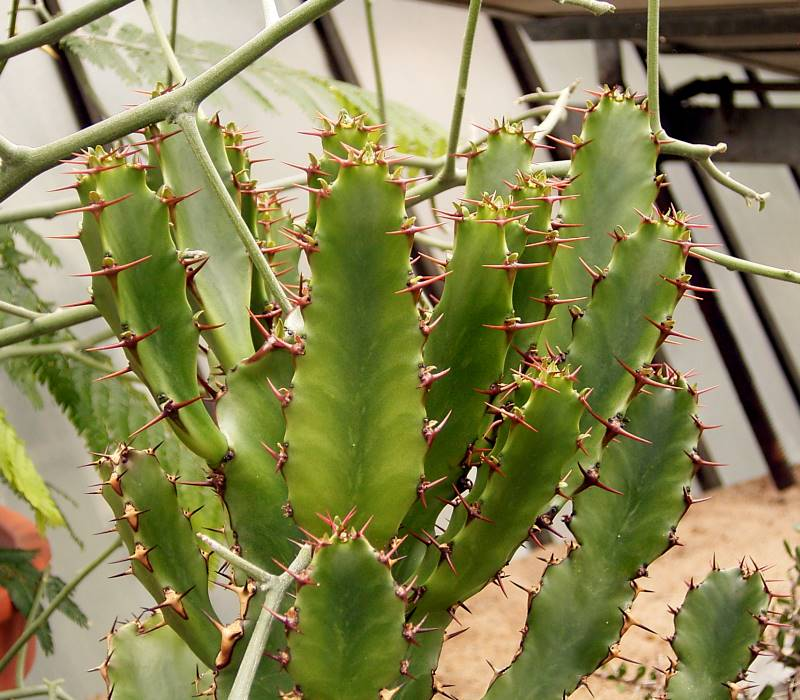 Euphorbia parviceps